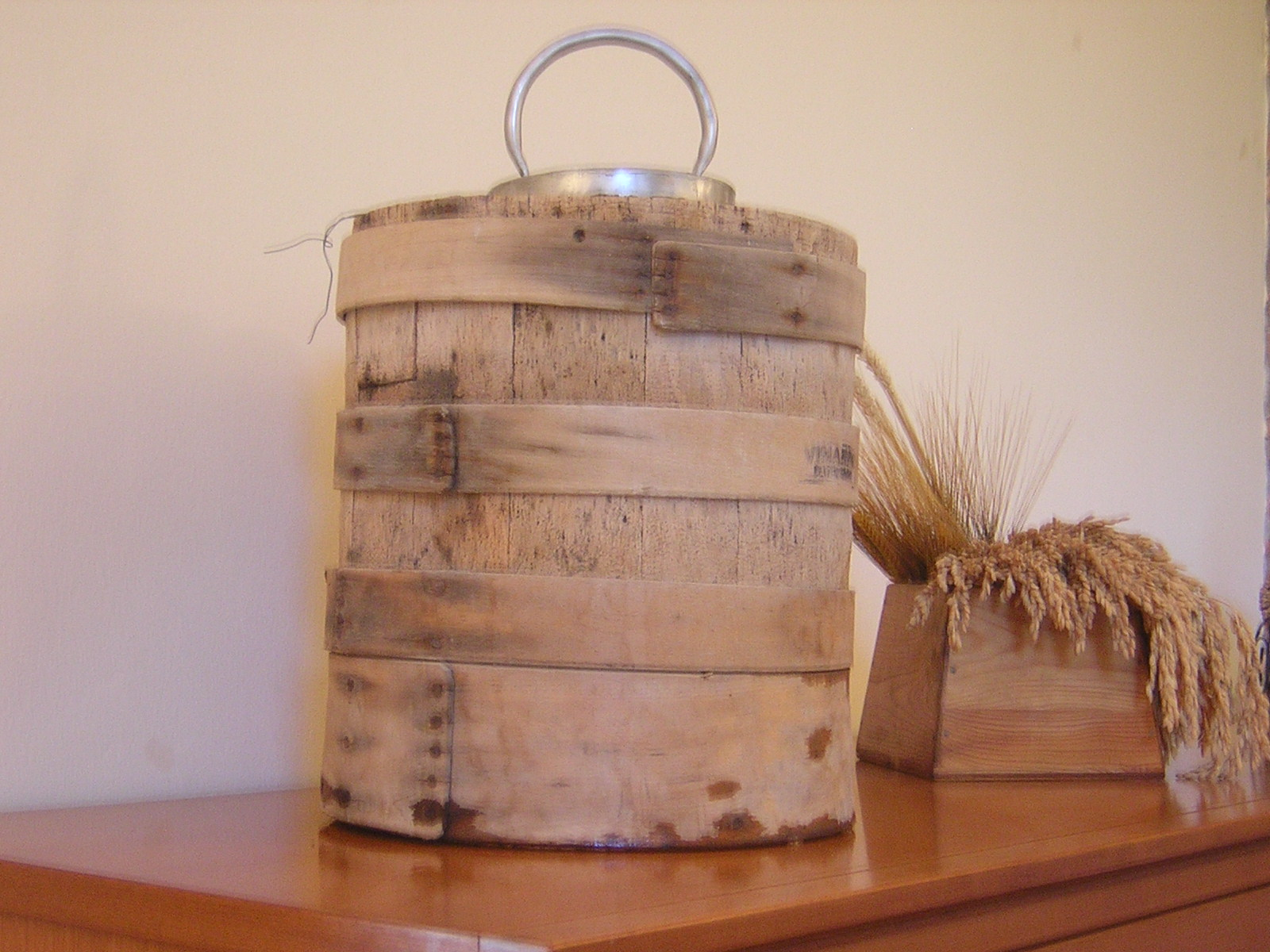 Orxatera tradicional valenciana.